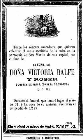 Victoria Balfer y Roser esquela